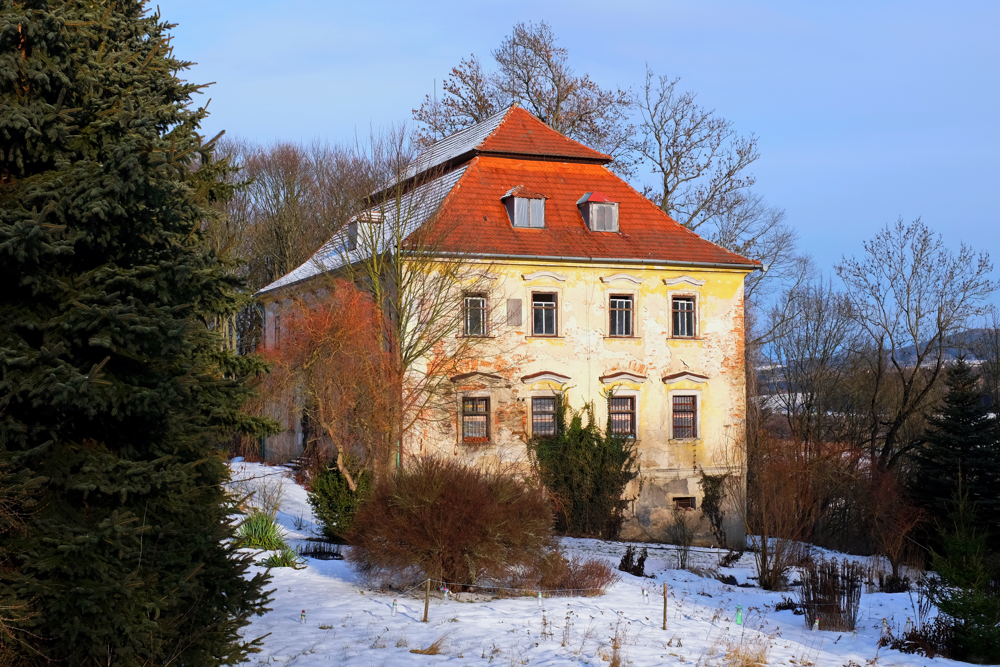 Starý zámek Dasnice, Chlumek 91, Dasnice.